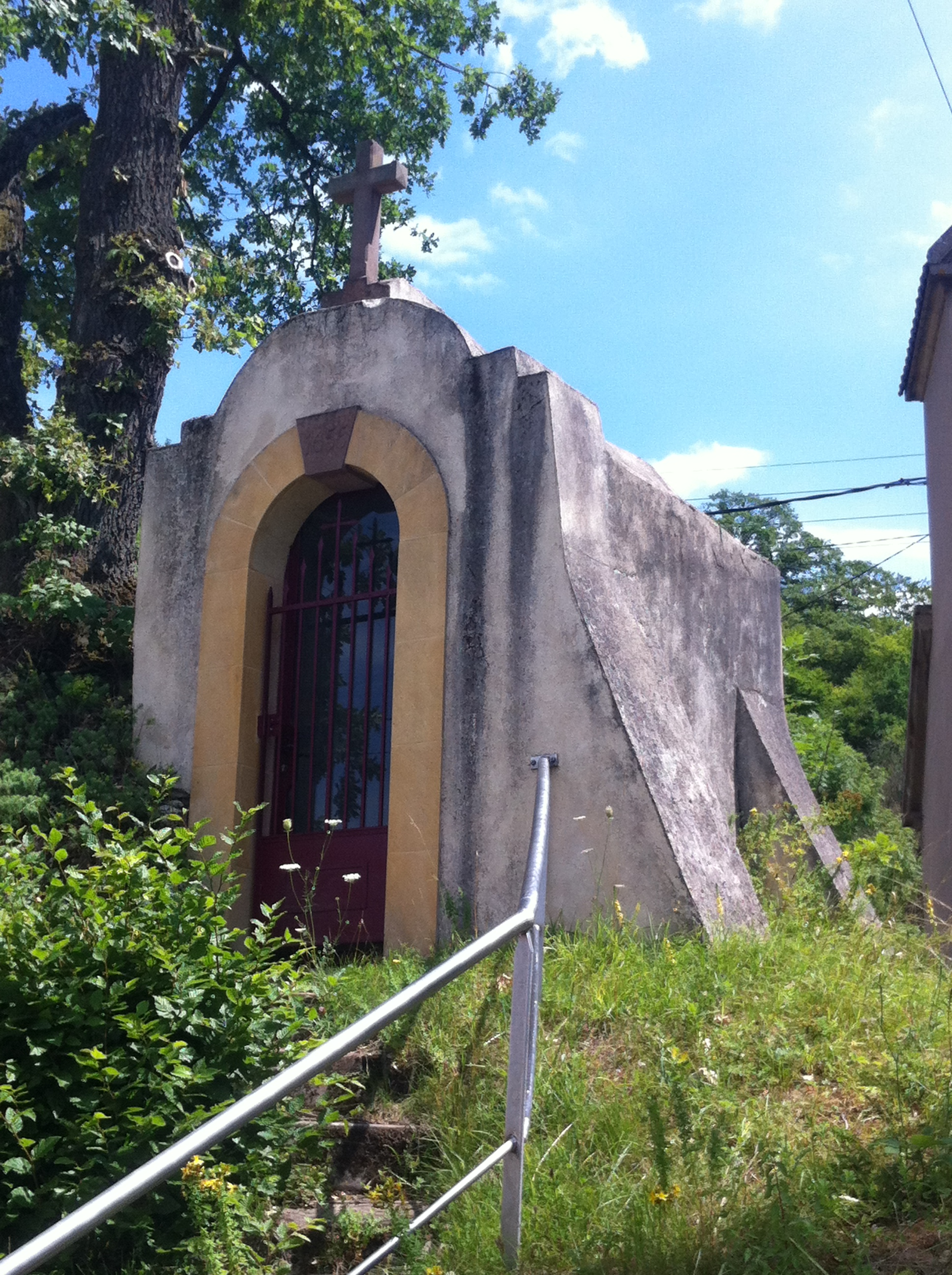 Kedange sur Canner chapelle